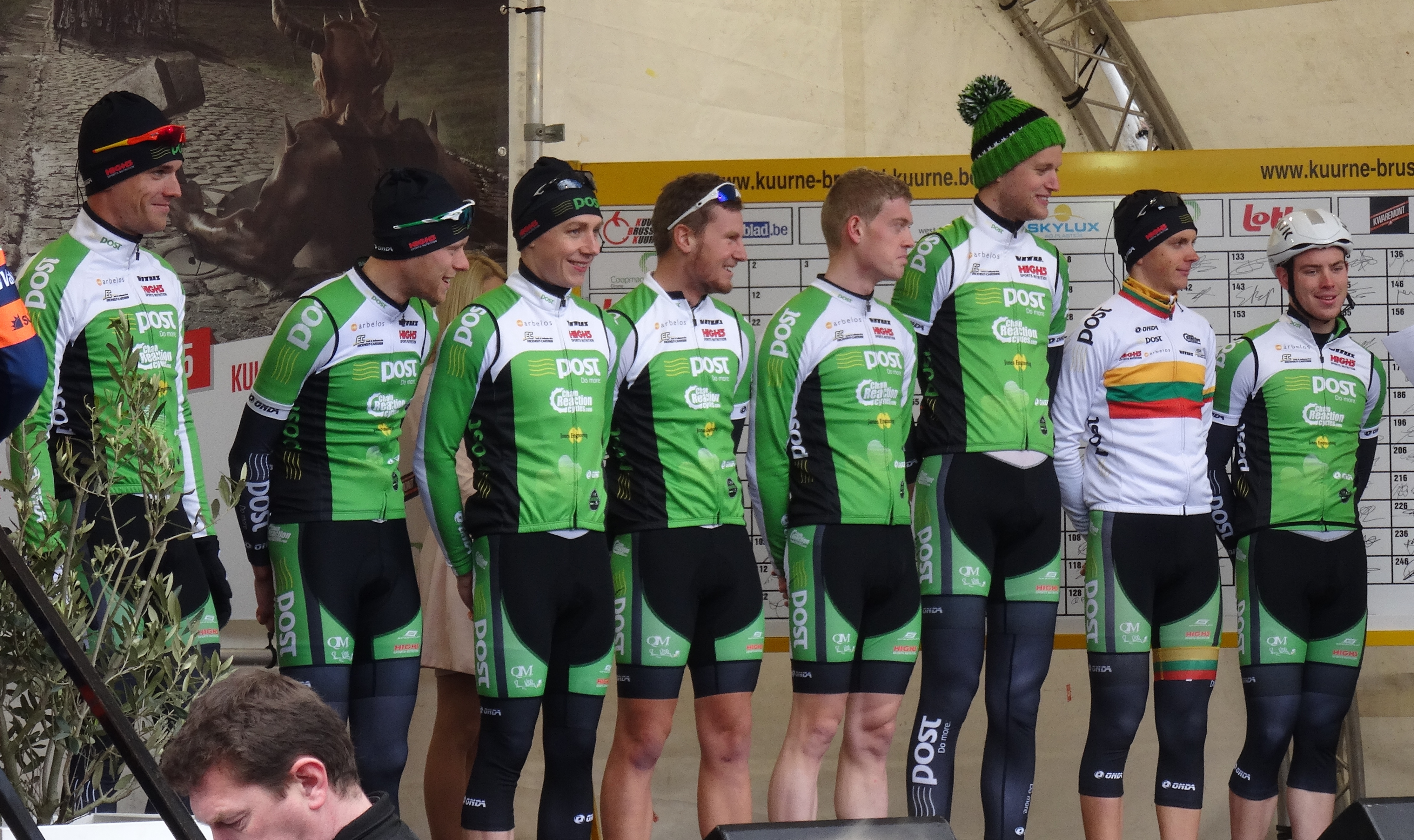 Reportage réalisé le dimanche 1er mars à l'occasion du départ et de l'arrivée de Kuurne-Bruxelles-Kuurne 2015 à Kuurne, Belgique.